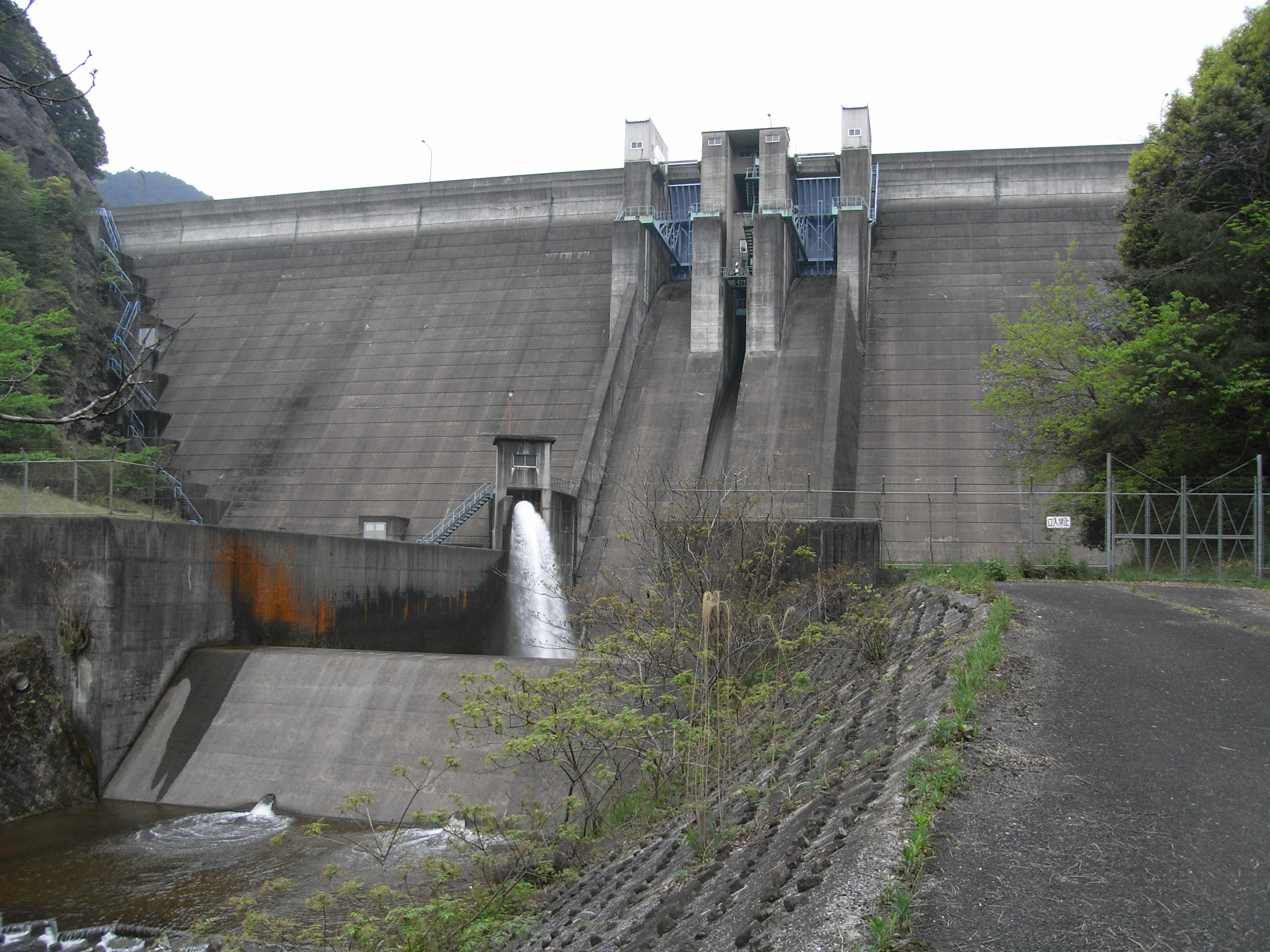 Dam